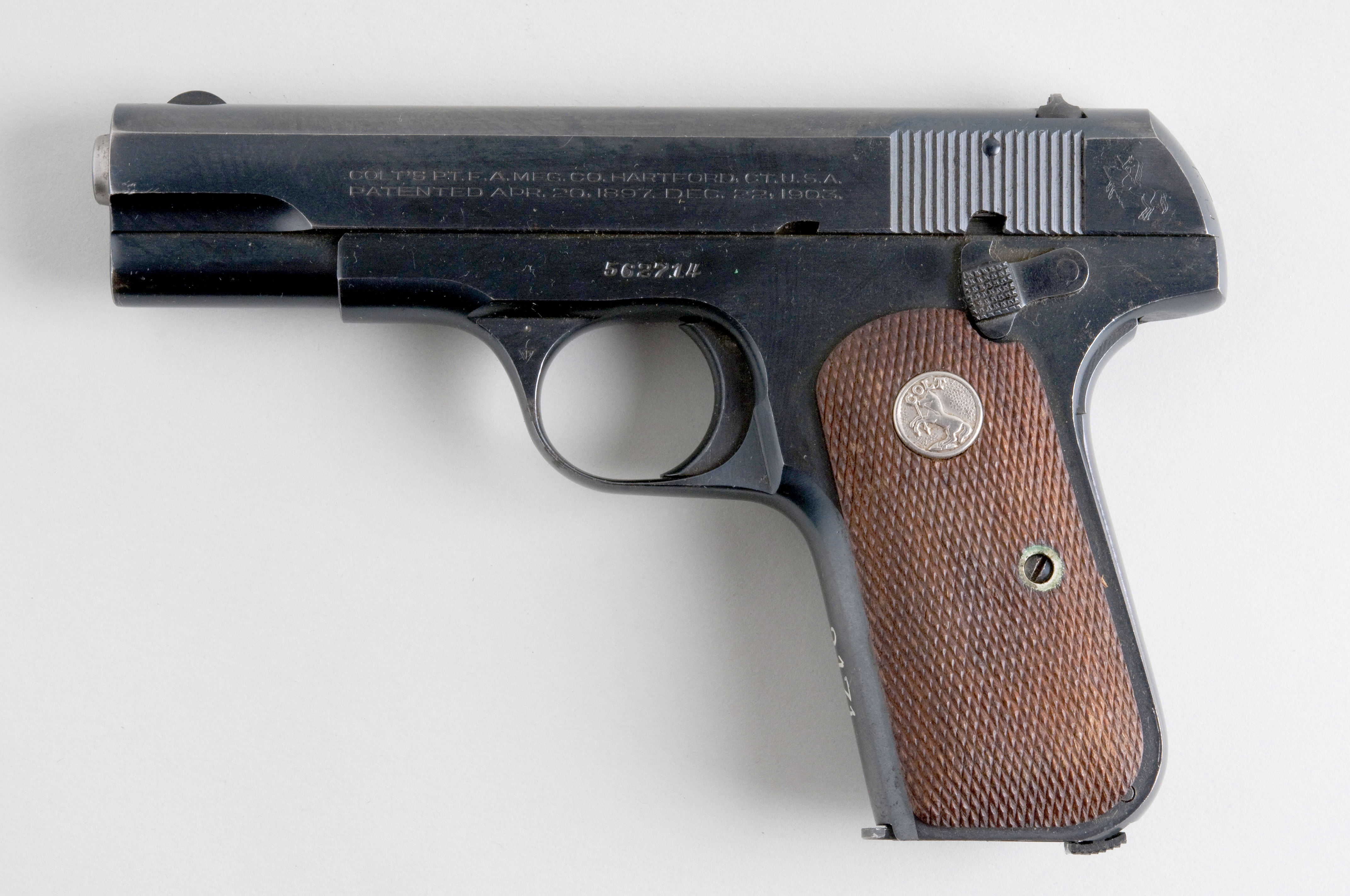 Colt 1903 From flickr user handvapensamlingen - Pistols used in Norway.